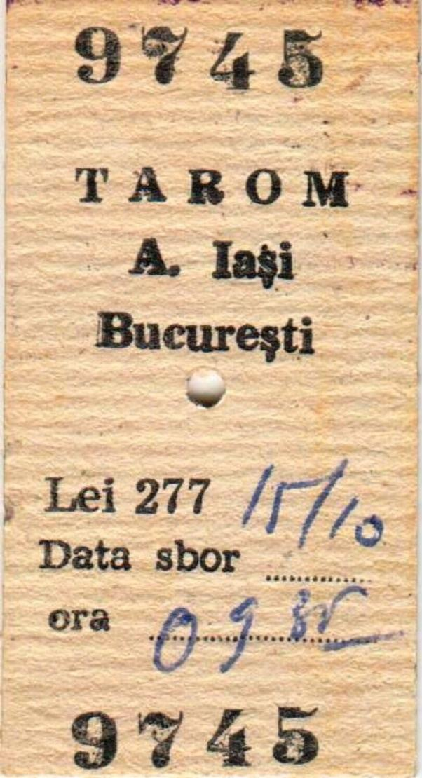 Flugticket der staatlichen rumänischen Fluggesellschaft TAROM